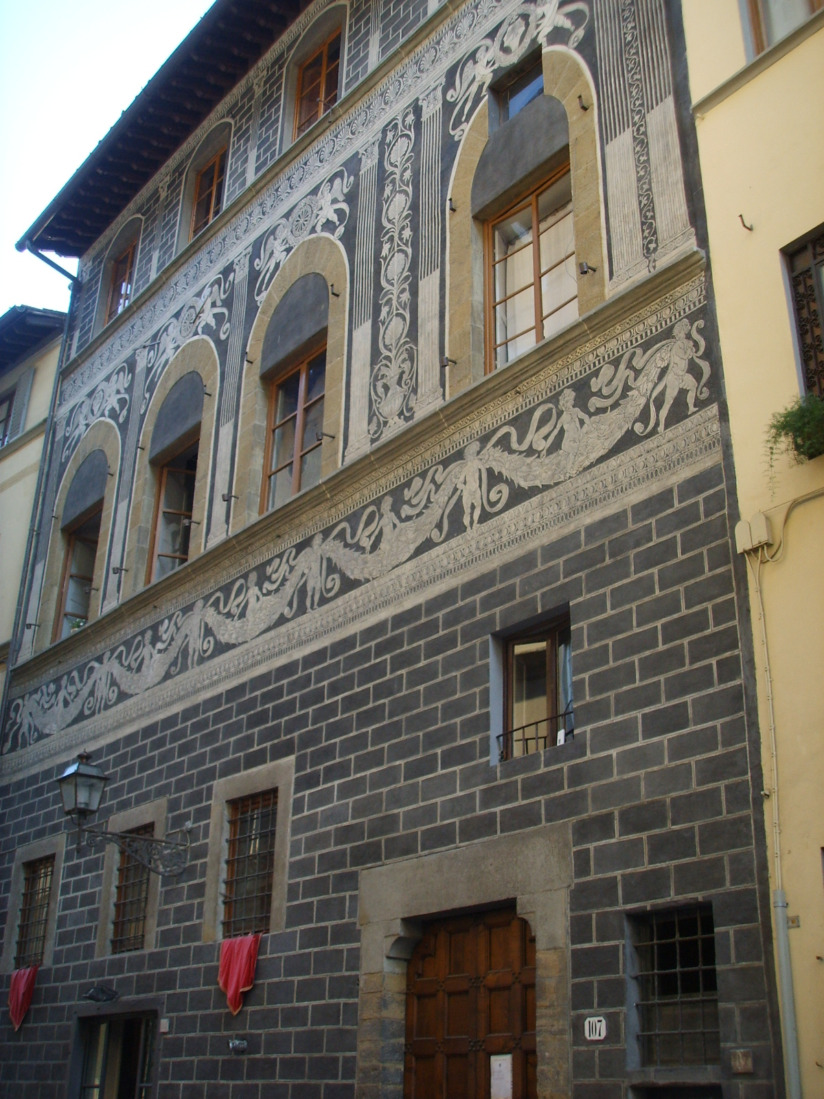 Palazzo nasi-quaratesi, via san niccolò 107